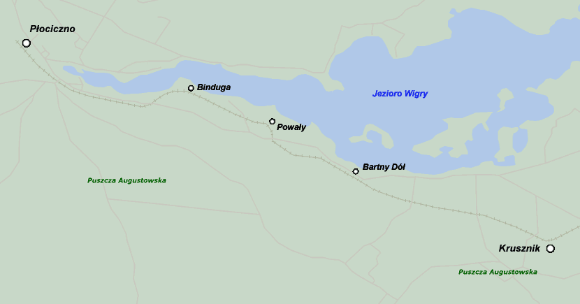 Plan trasy Wigierskiej Kolei Wąskotorowej Płociczno - Krusznik.